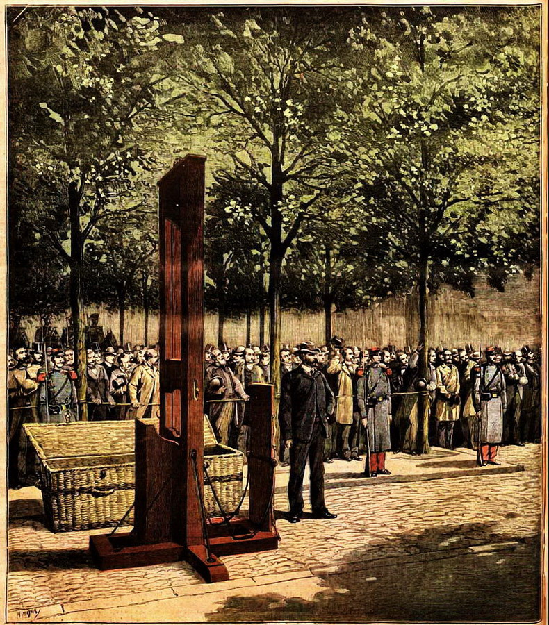 « La guillotine attend l'arrivée de [Gustave] Doré et de [Adolphe] Berland », executed July 27, 1891 at La Roquette, Paris